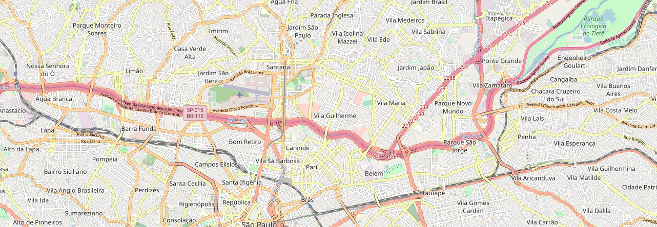 Mapa da marginal Tietê, São Paulo, Brasil. This map may be incomplete, and may contain errors. Don't rely solely on it for navigation.